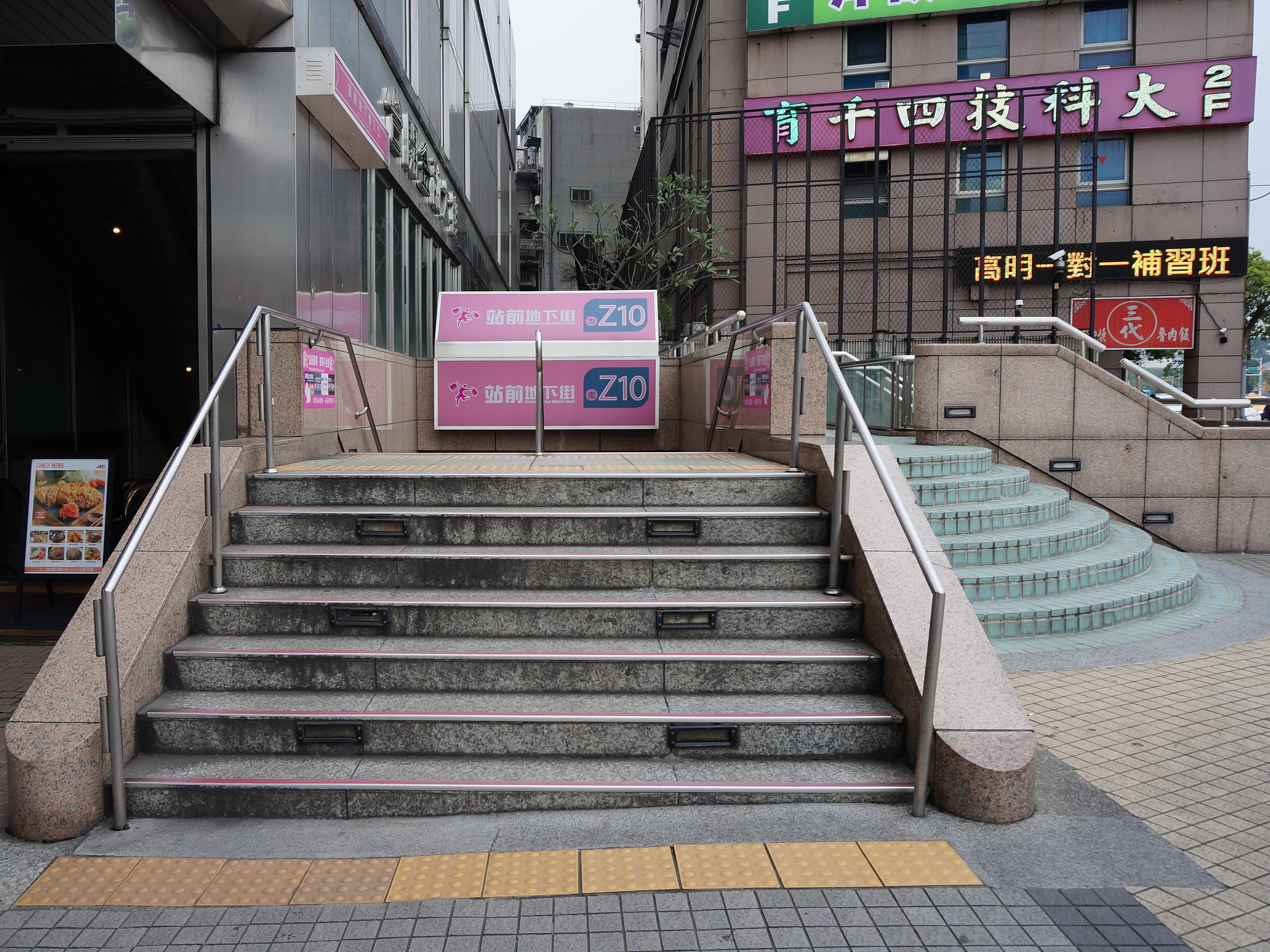 中文（台灣）: 臺北市站前地下街Z10出口，位於台開金融大樓重慶南路大門右側。